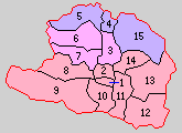 岩手県紫波郡の町村。